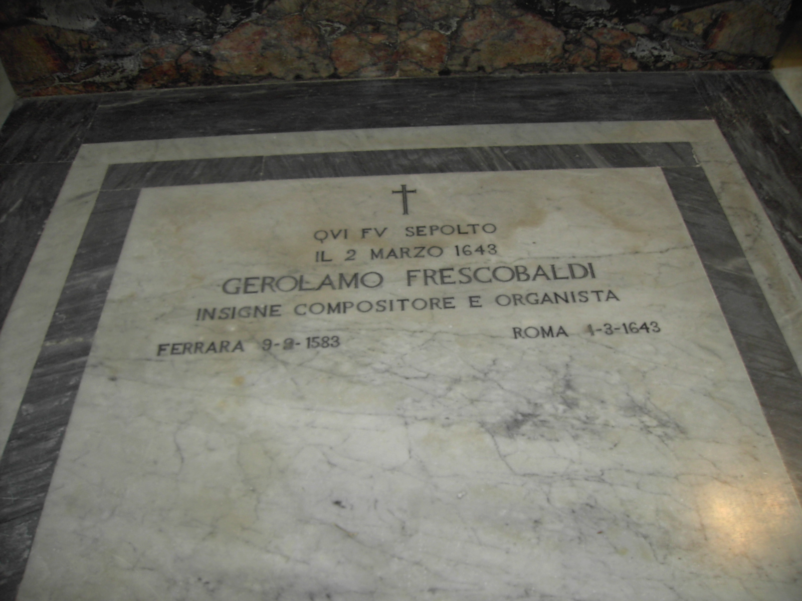 Roma , basilica dei Santi Apostoli: lapide tombale del compositore Girolamo Frescobaldi §Licensing